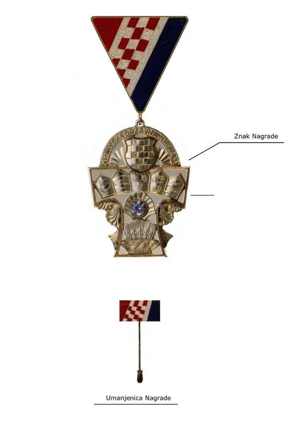 Hrvatska državna nagrada (mali znak)